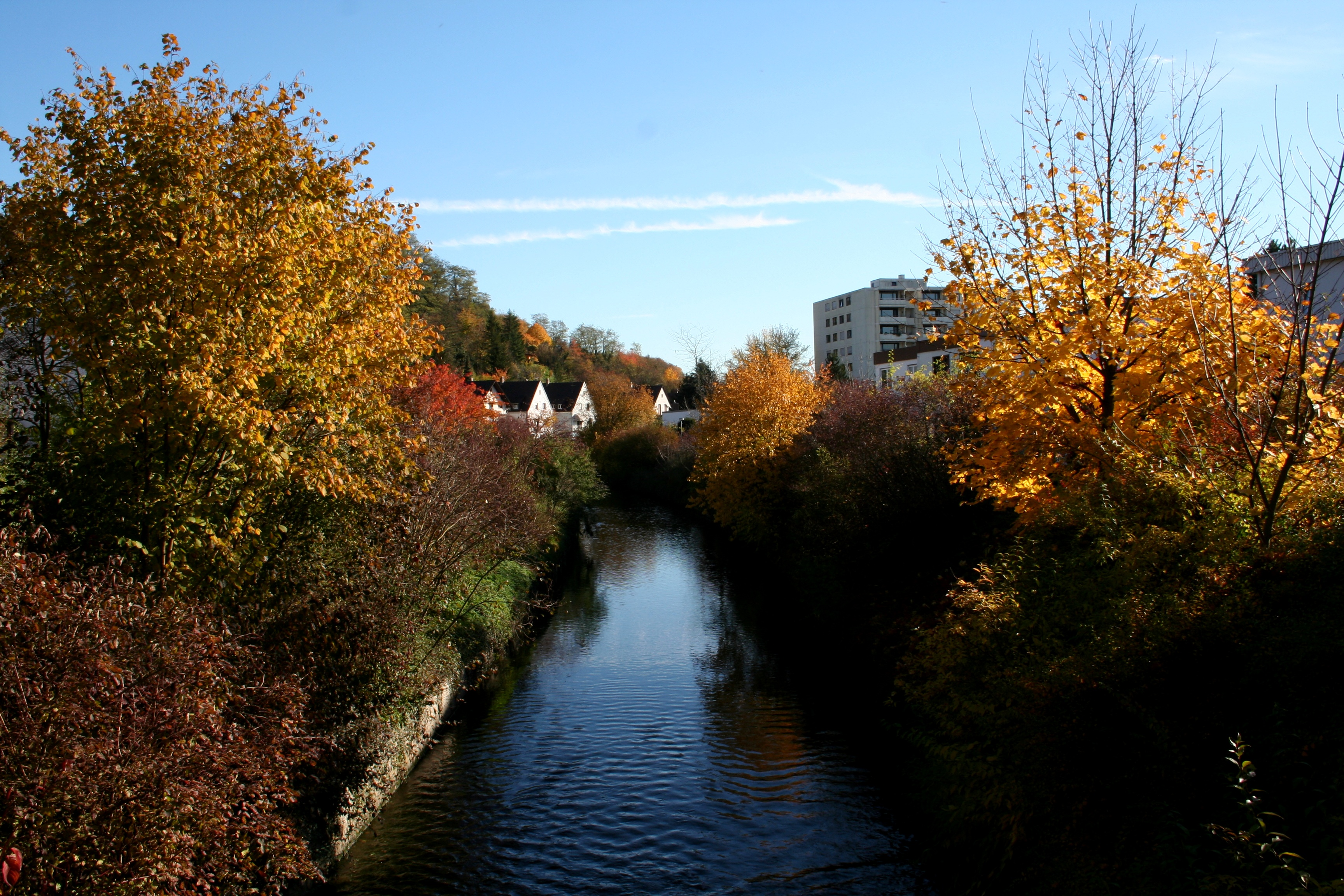 Saalbach, Bruchsal, Germany.